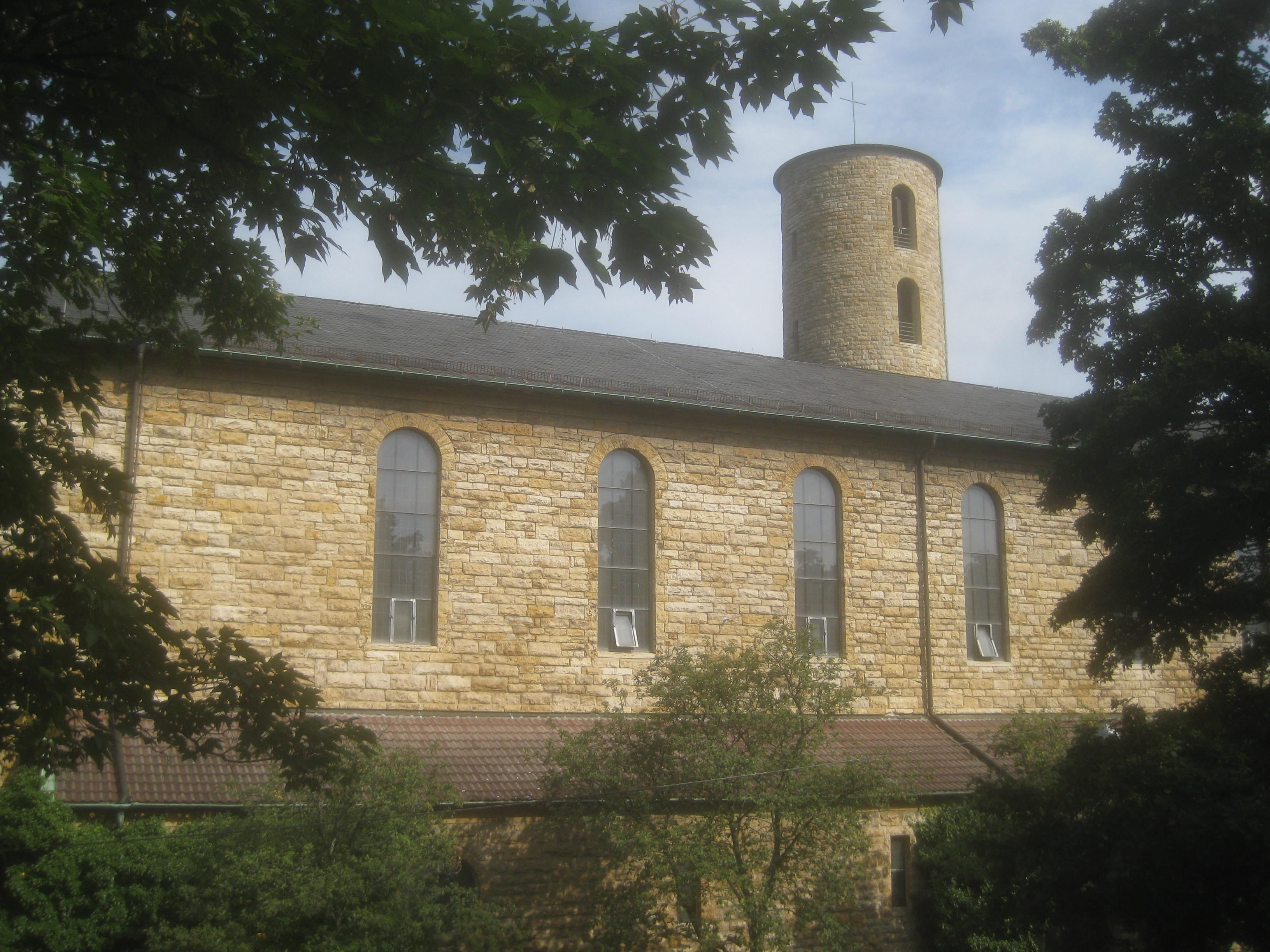 Katholische Herz Jesu-Kirche in Stuttgart, Ansicht vom Friedhof Gaisburg aus.